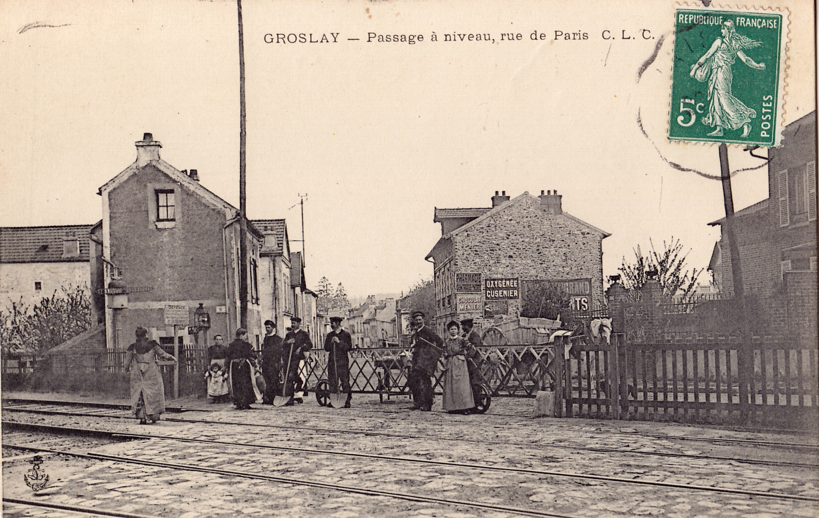 Carte postale ancienne éditée par C. L. C. :GROSLAY - Passage à niveau, rue de Paris